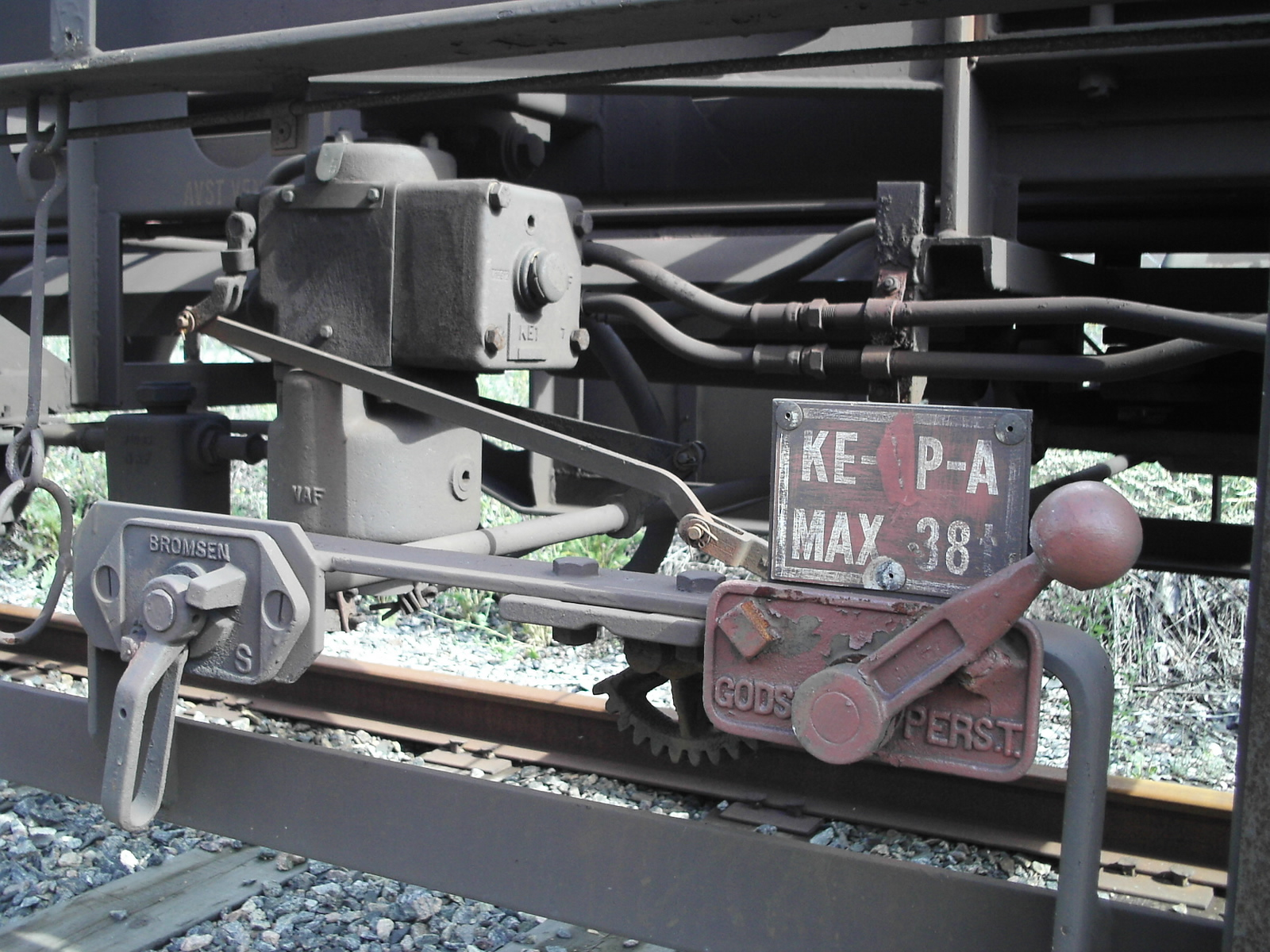 Reglerventil till tågbroms